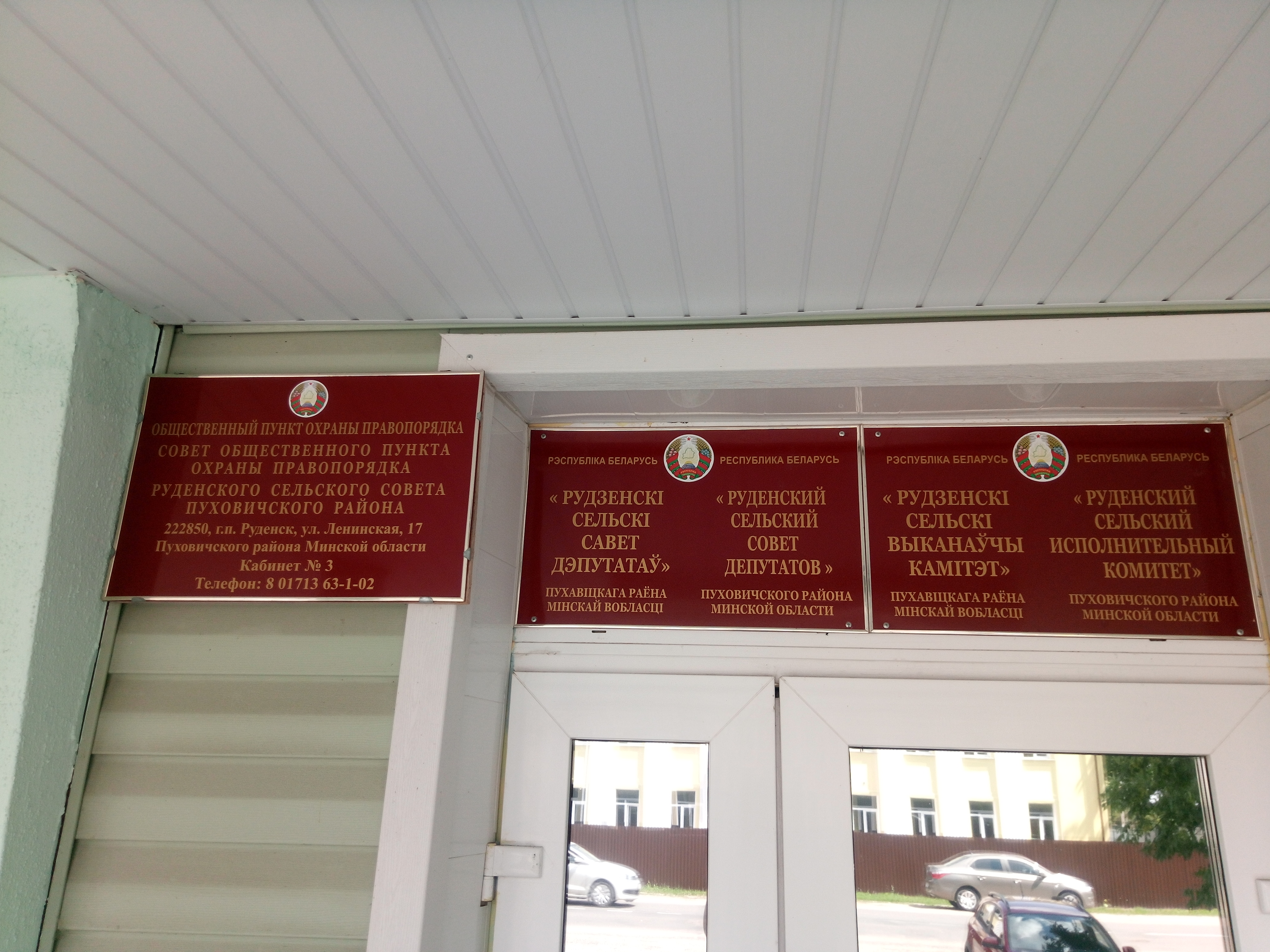 Таблічкі. Рудзенскі сельсавет.